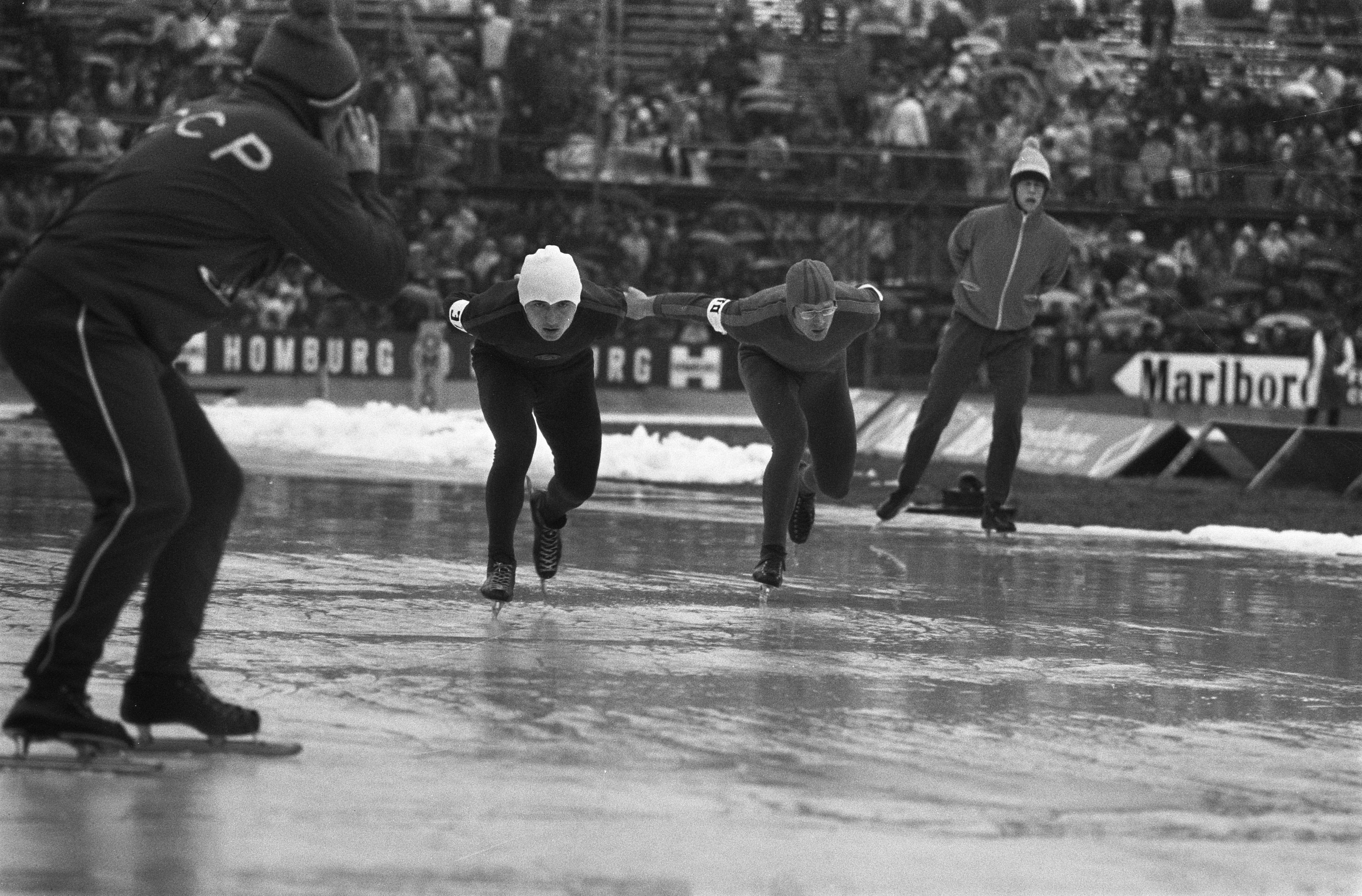 Collectie / Archief : Fotocollectie Anefo Reportage / Serie : [ onbekend ] Beschrijving : Wereldkampioenschappen schaatsen voor amateurs in Deventer nummer 26A Ivanov (links) en Kuipers in aktie Datum : 18 februari 1973 Locatie : Deventer Trefwoorden : AMATEURS, SCHAATSEN, sport Persoonsnaam : Ivanov Fotograaf : Verhoeff, Bert / Anefo Auteursrechthebbende : Nationaal Archief Materiaalsoort : Negatief (zwart/wit) Nummer archiefinventaris : bekijk toegang 2.24.01.05 Bestanddeelnummer : 926-2316